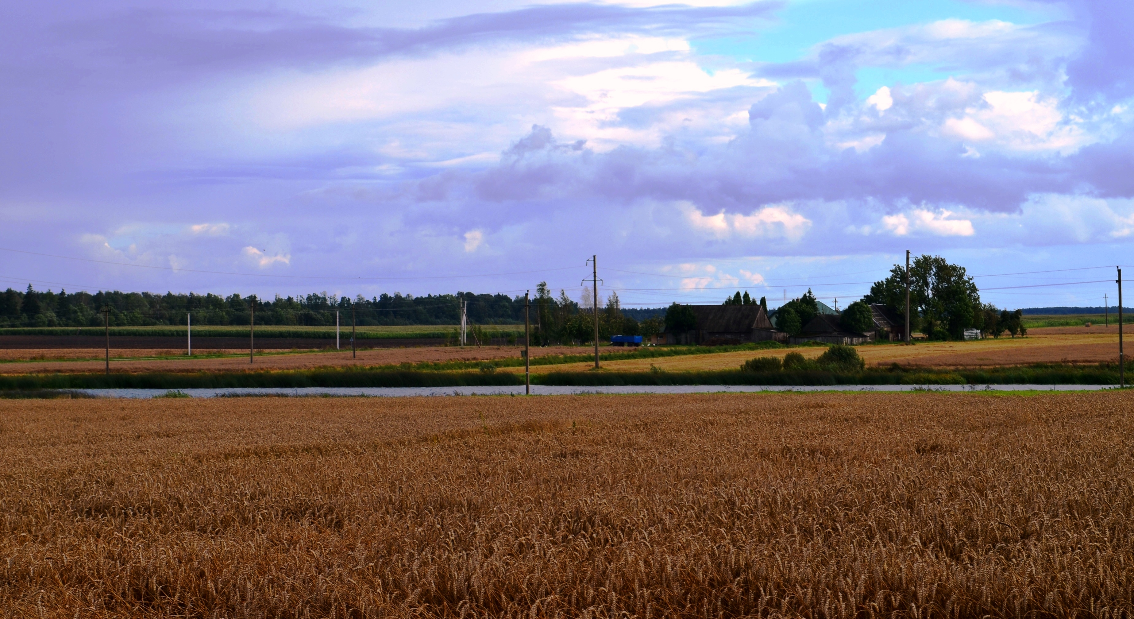 Jaugilių kaimas ir ežeras, Kėdainių r.